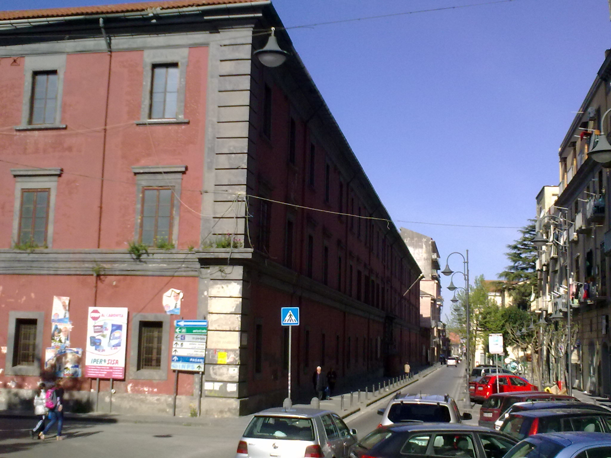 Facciata della Caserma Tofano, Nocera Inferiiore